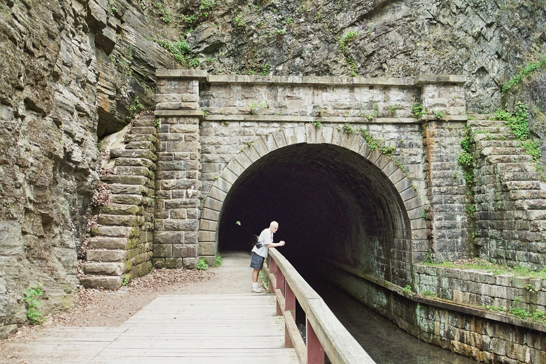 C&O Canal, Nord Portal